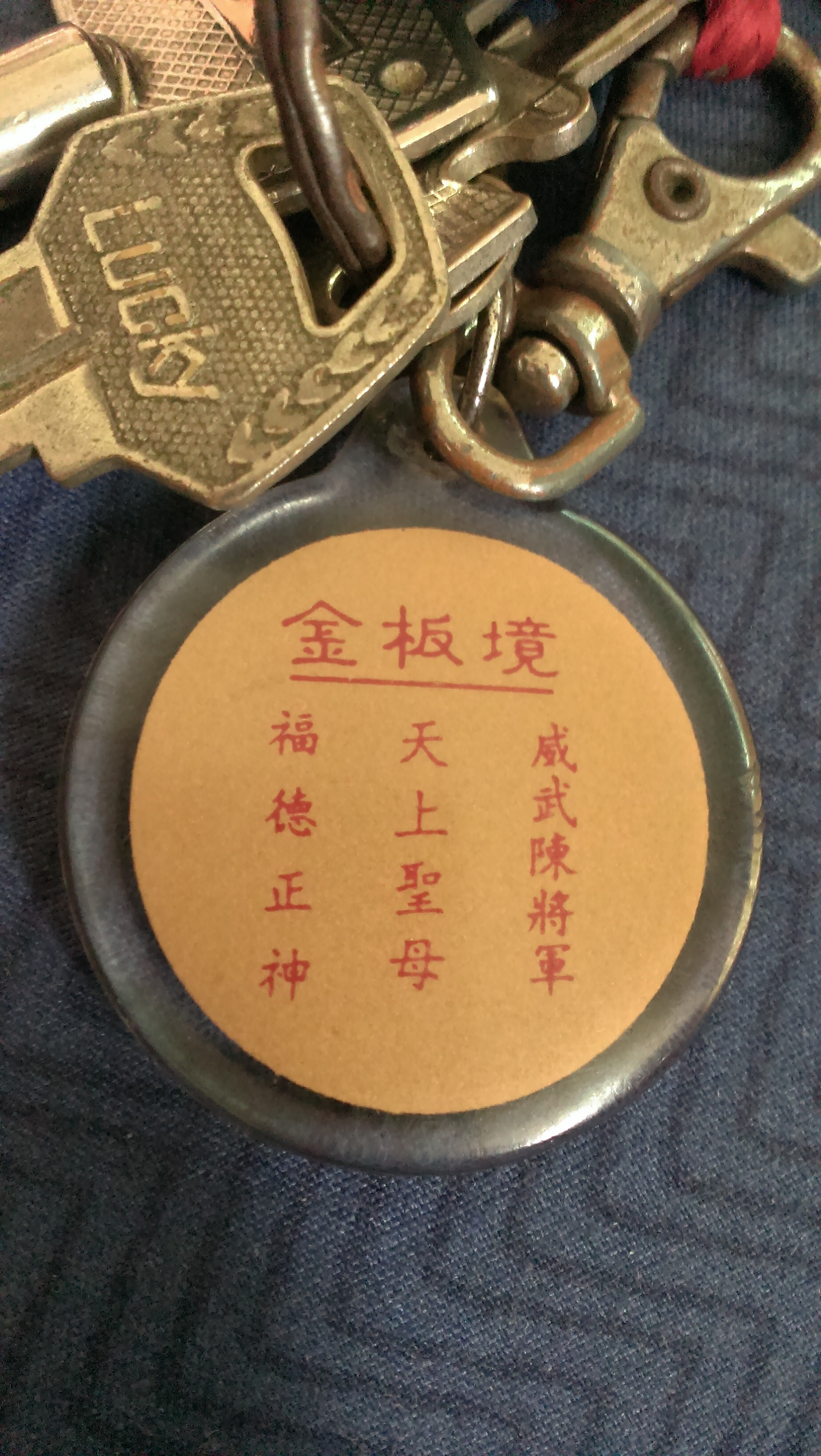 馬祖南竿鄉金板境天后宮所製鑰匙圈，龍邊設有威武陳將軍神龕